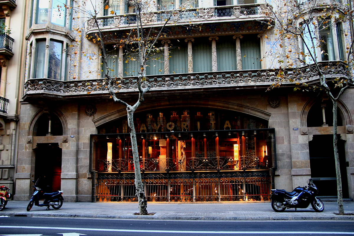 Casa Thomas de Lluís Domènech i Montaner (1898), ubicada al C/ Mallorca 293 de Barcelona (Catalunya). Detall de la planta baixa.